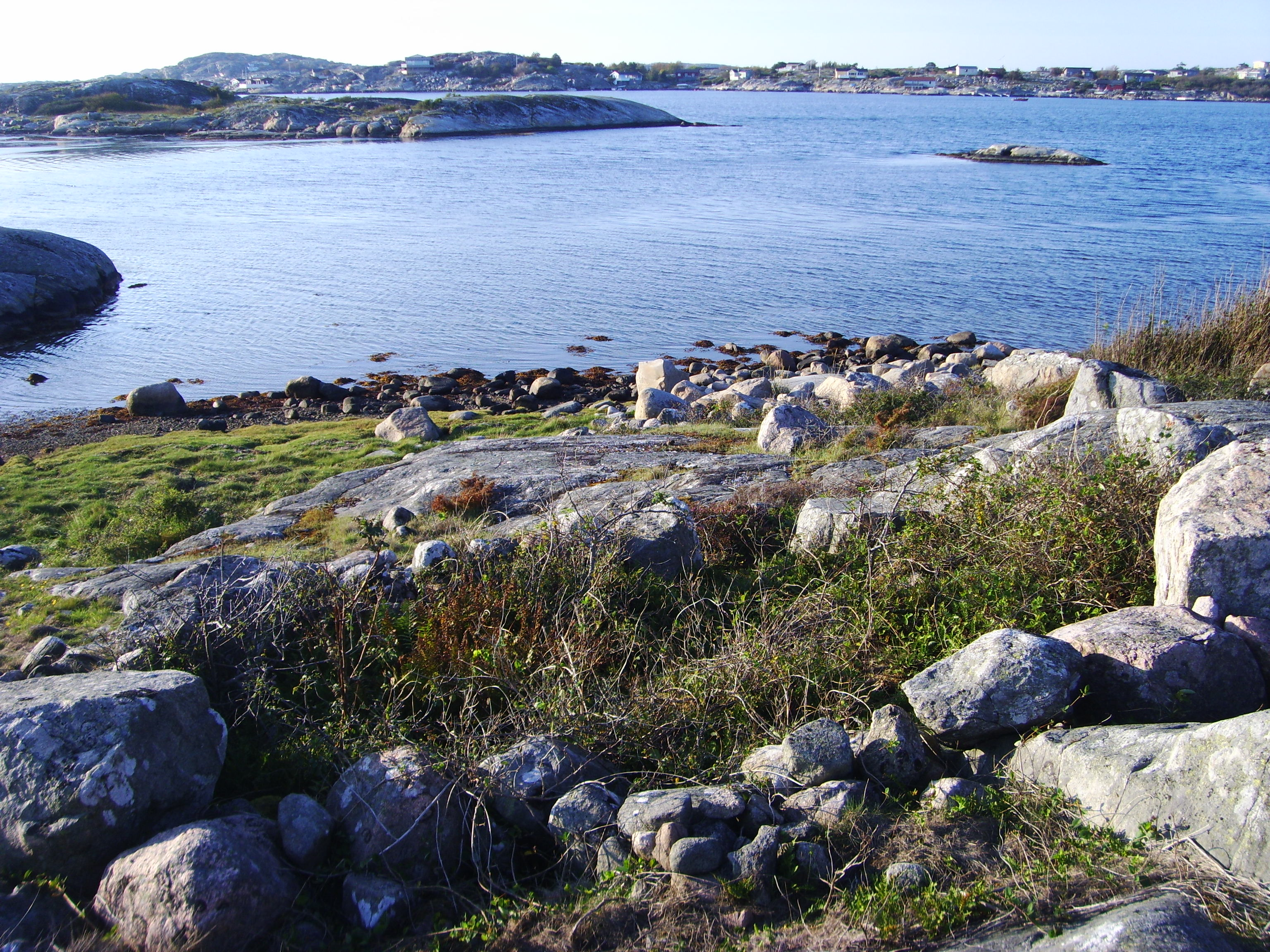 Tomtning är en arkeologisk lämning efter byggnad i form av stenmurar kring en stenröjd golvyta i marknivå. Termen används för lämningar efter strandnära byggnader i maritim miljö. Dateringarna kan skifta kraftigt, men ofta är de anlagda under järnålder och medeltid. Skillnaden mellan husgrund och tomtning är att i en tomtning har marken använts som golv.